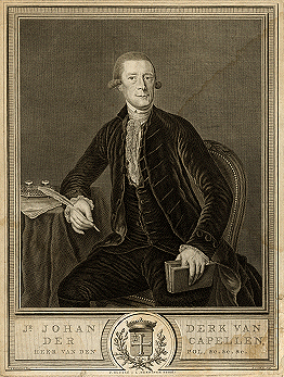 Portret van Joan Derk van der Capellen tot den Pol